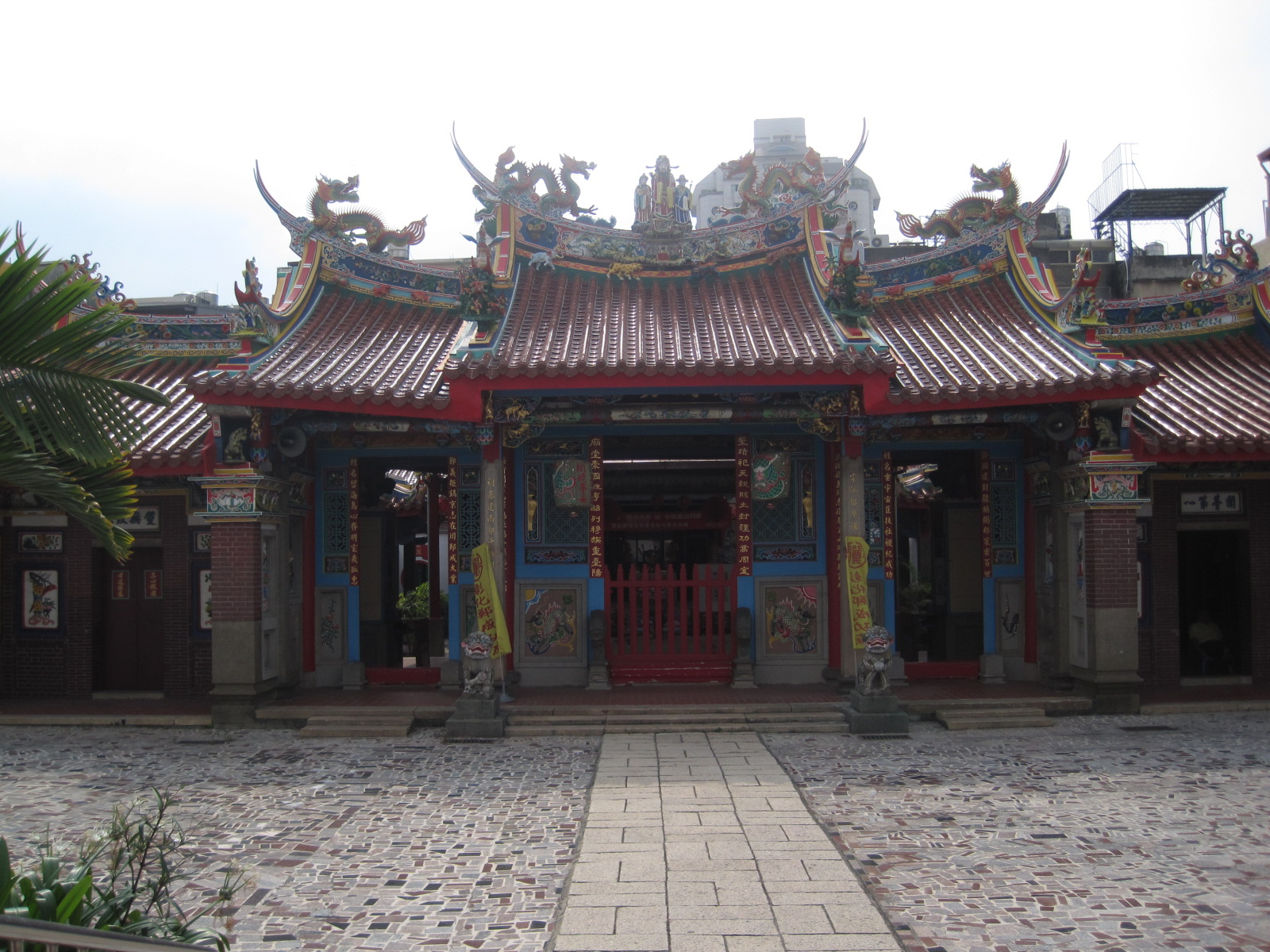 彰化鄭成功廟